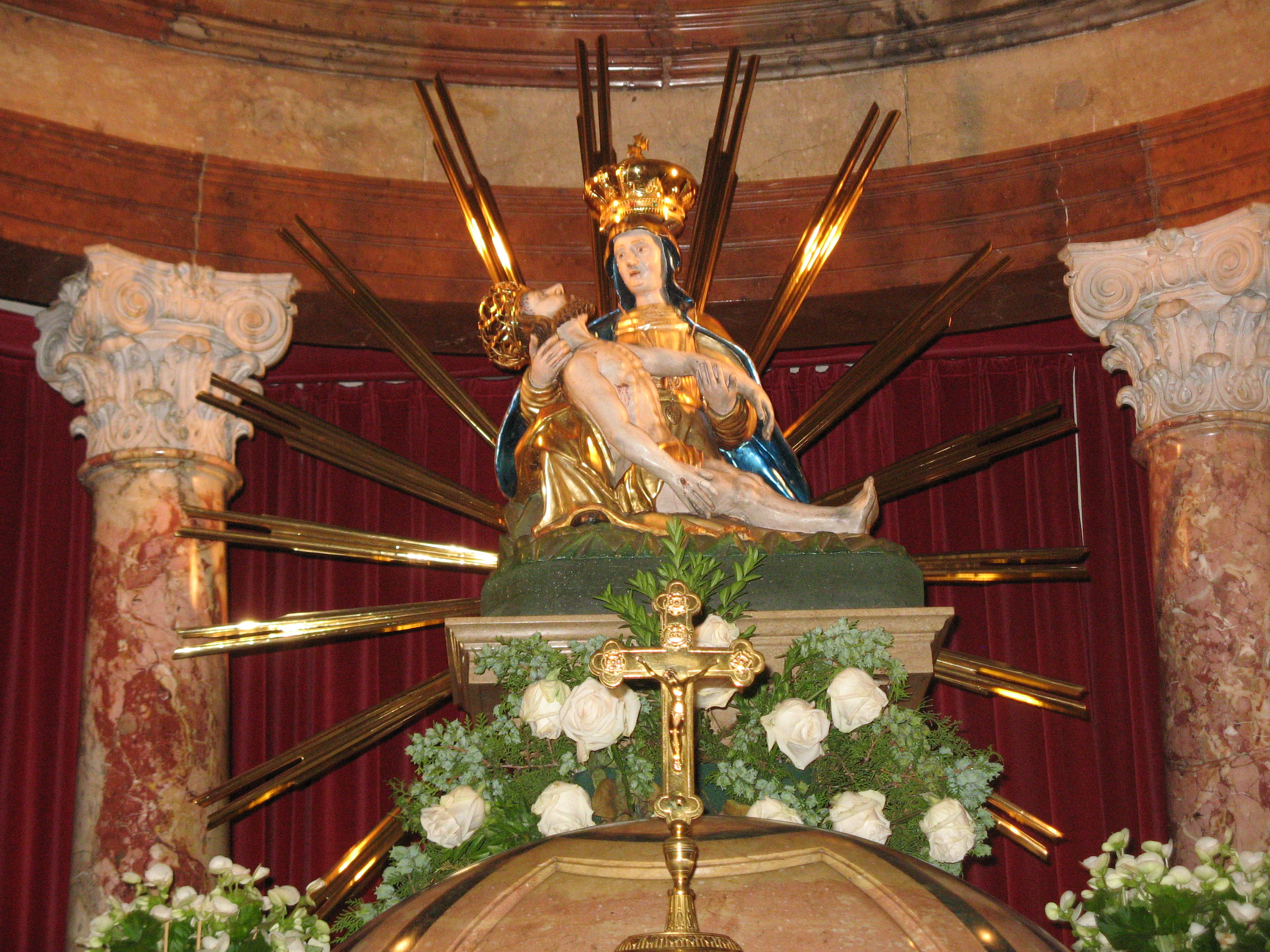 Gnadenbild der gekrönten Pieta, Wallfahrtskirche Maria Lanzendorf, Niederösterreich